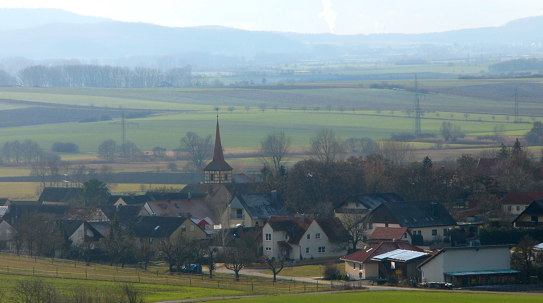 Blick auf Wiebelsheim